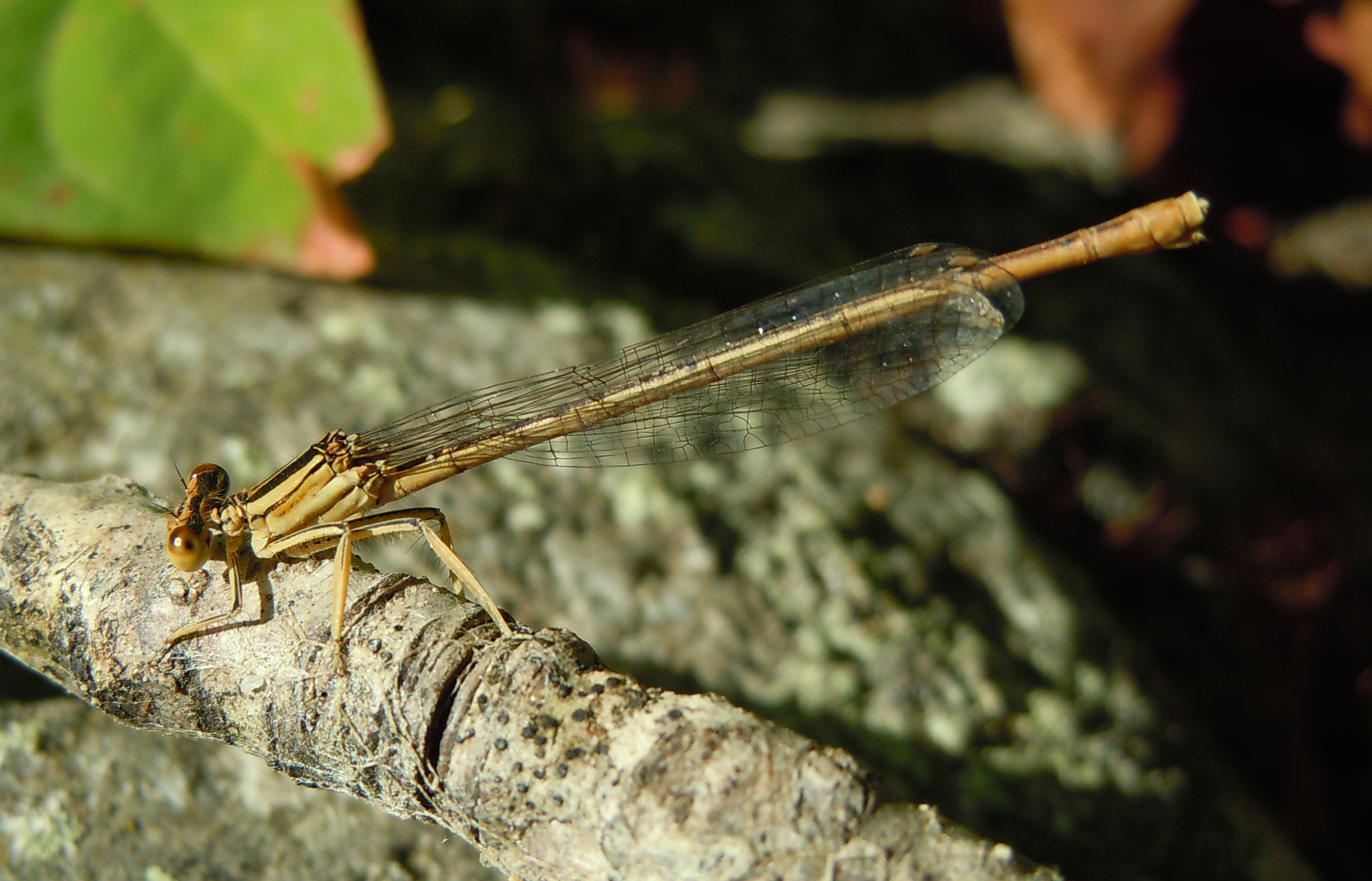 Platycnemis latipes - Agrion blanchâtre - femelle - Ardèche